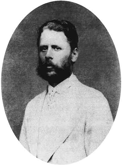 Граф Григорий Сергеевич Строганов (1829-1917)